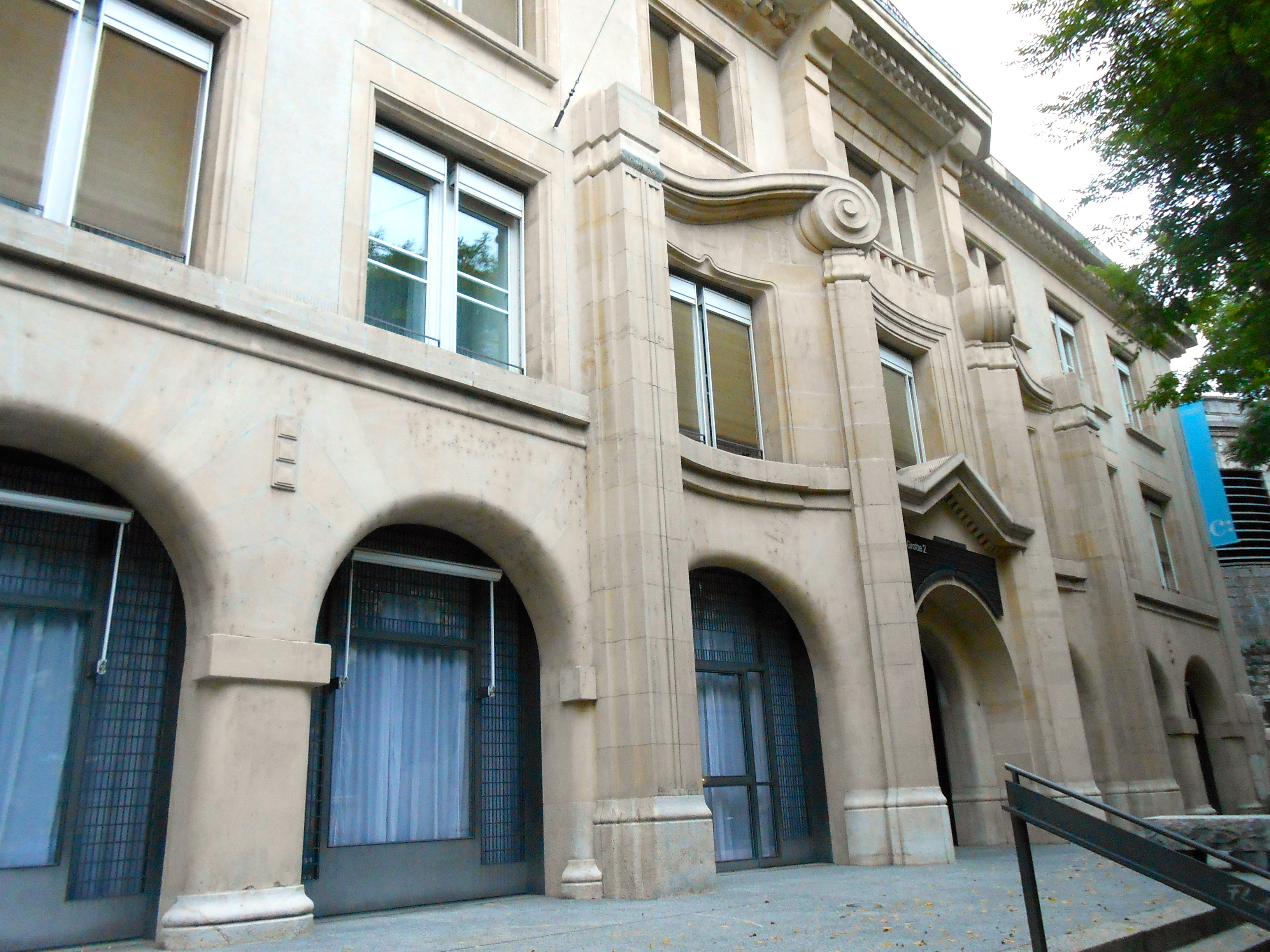 Rue de la Grotte 2, Lausanne